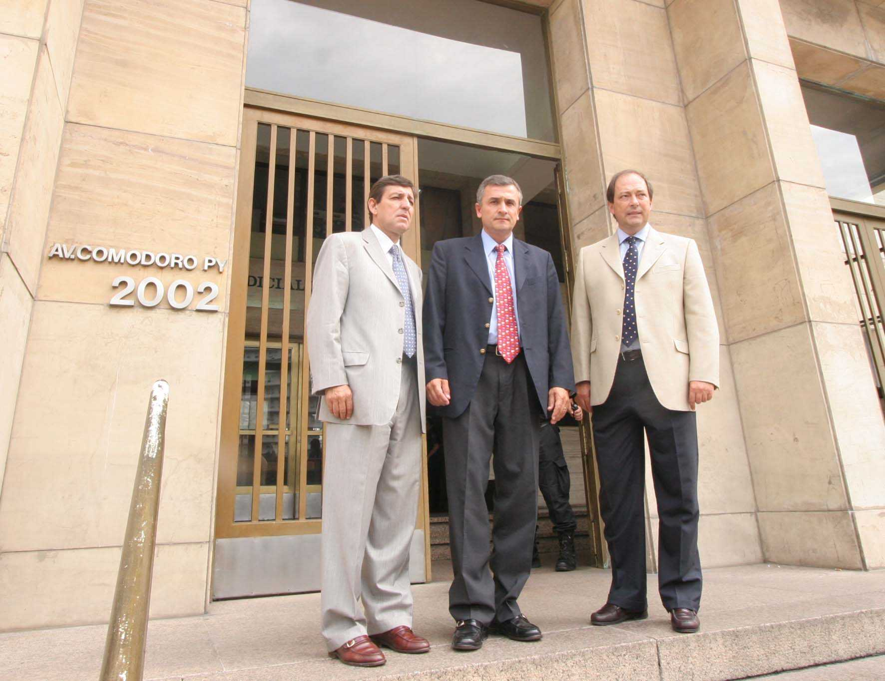 Los legisladores radicales Alejandro Nieva, Gerardo Morales y Ernesto Sanz ingresan a los tribunales federales con la demanda contra el secretario de Transporte, Ricardo Jaime.